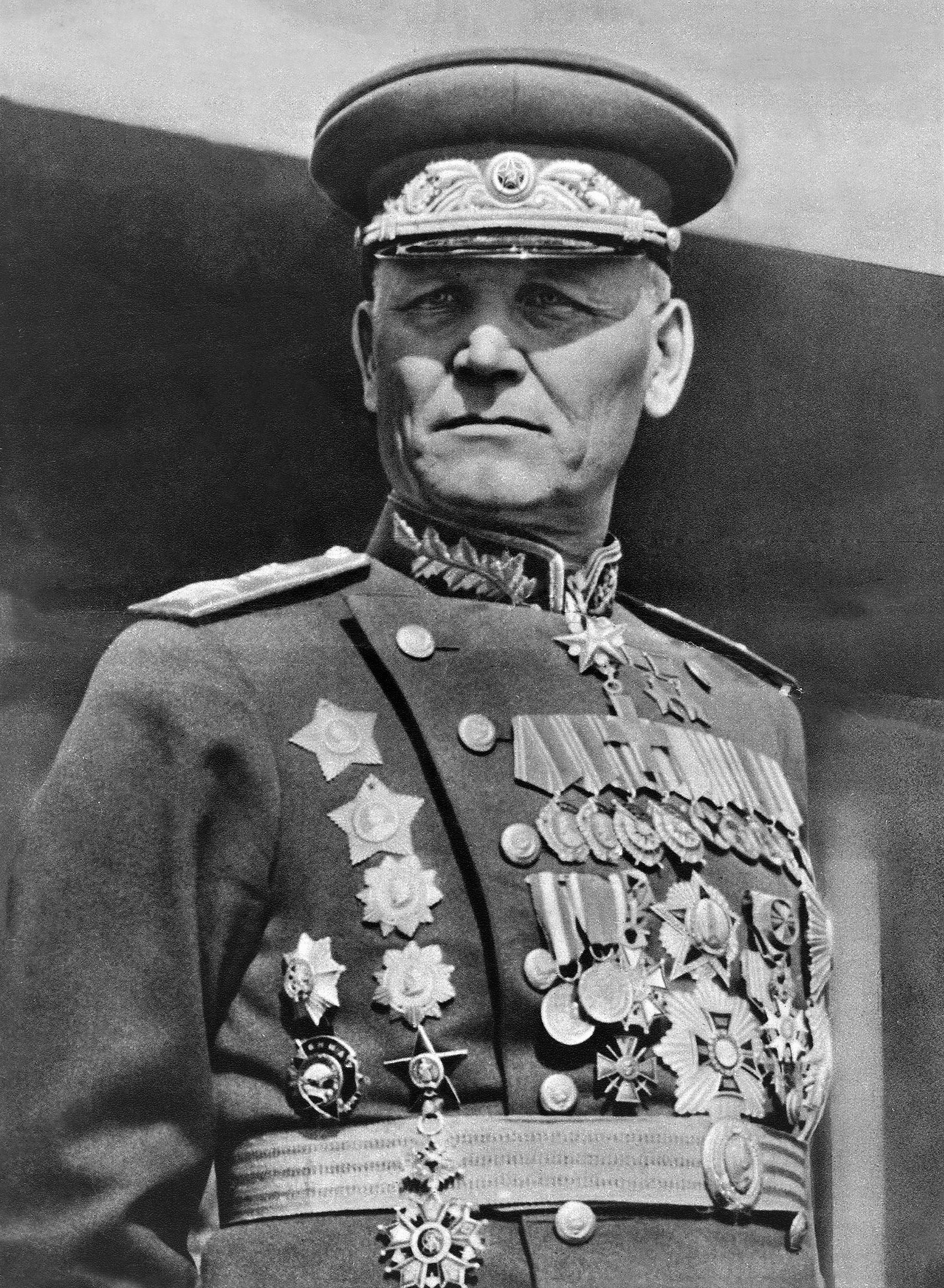 Маршал Советского Союза дважды Герой Советского Союза Иван Степанович Конев накануне Парада Победы